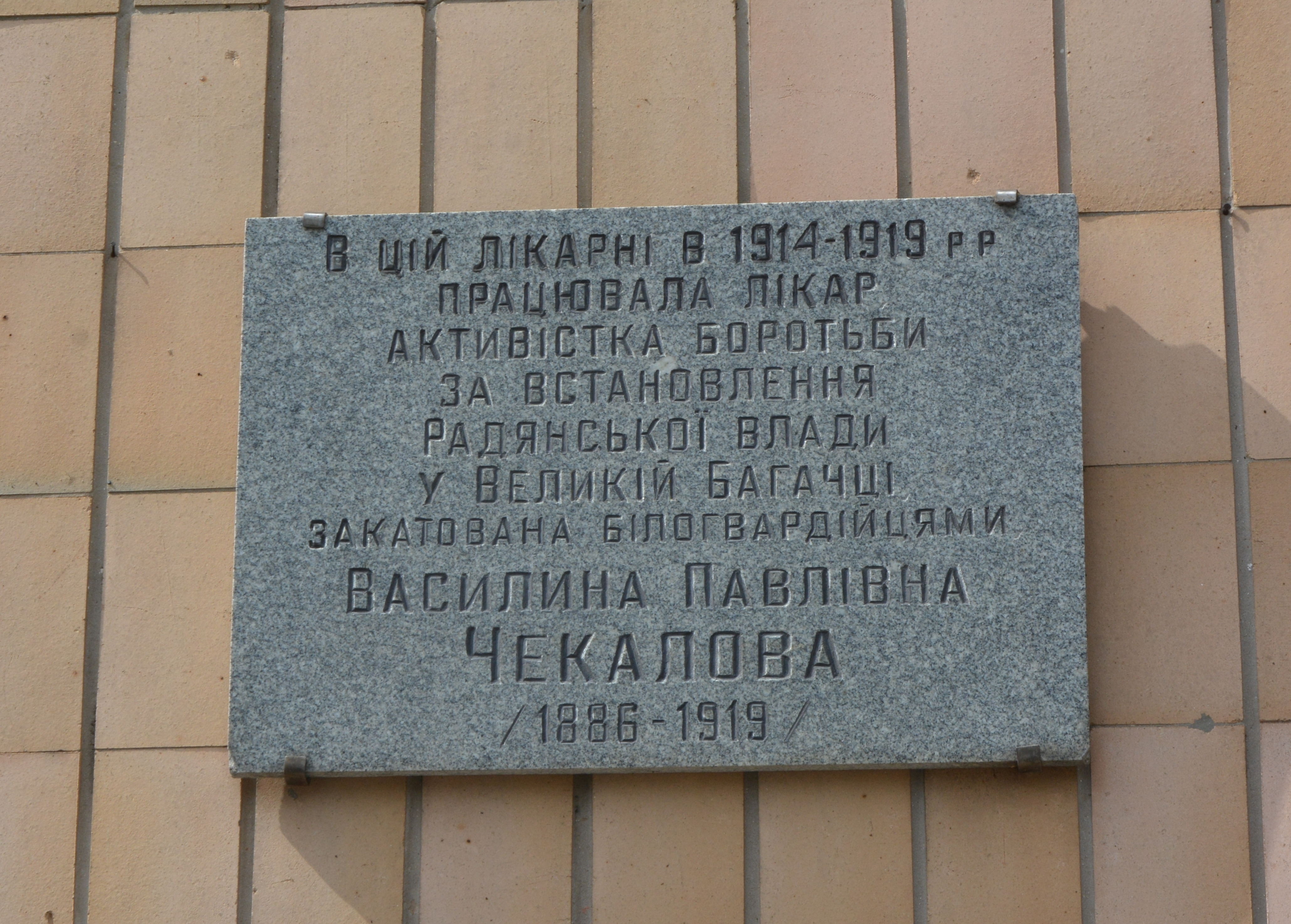 Меморіальна дошка на честь лікаря В.П.Чекалової, смт В.Багачка, вул. Леніна, райлікарня